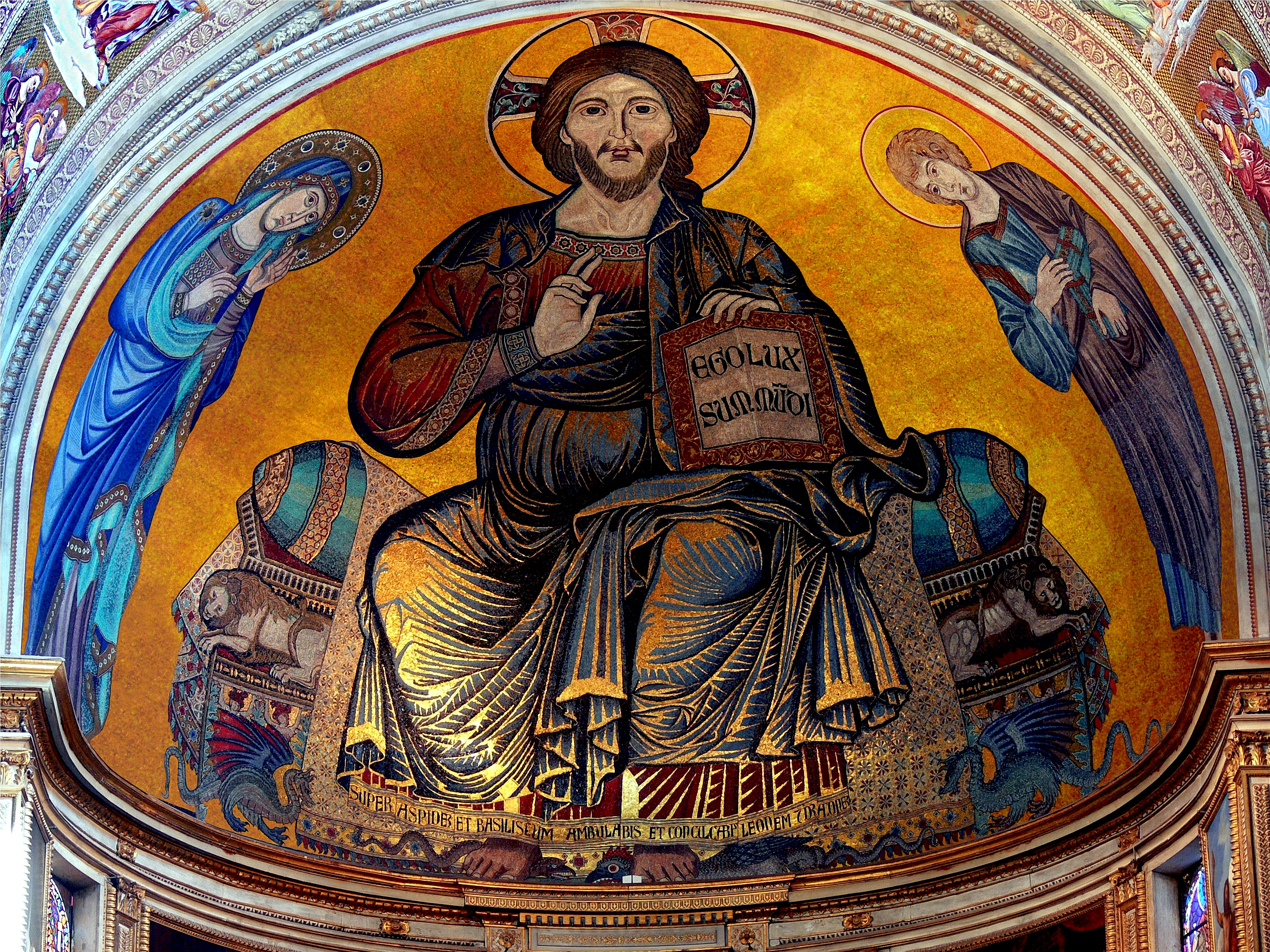 Deesis, mosaico di Cimabue nel catino absidale della cattedrale di Pisa, 1301/1302.